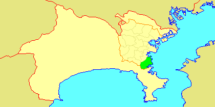 Map of Kanazawa-ku, Yokohama, Kanazawa-prefecture, Japan